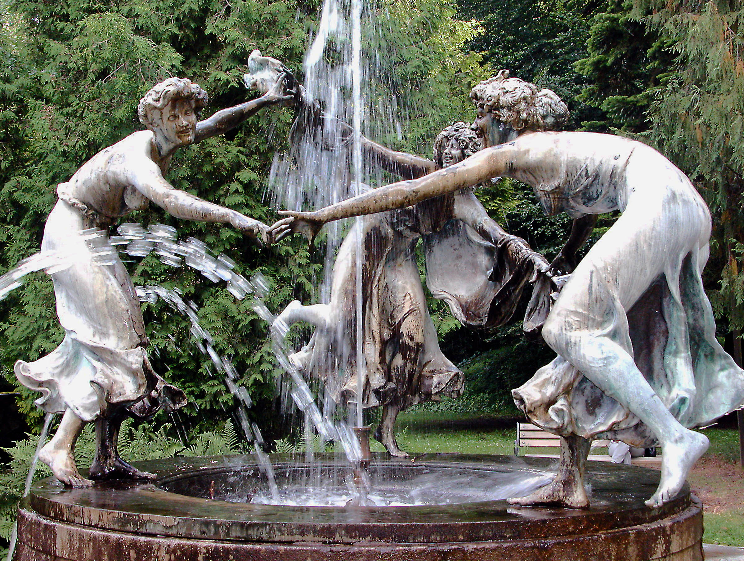 05.07.2003 17166 Burg Schlitz (Gem. Hohen Demzin): Mecklenburgs bedeutendste klassizistische Schloßanlage (1806-1824). Der Nymphenbrunnen (GMP: 53.701102,12.542426) im Park wurde 1903 von Walter Schott im Jugendstil für den Brunnenhof des Kaufhauses Wertheim in Berlin entworfen und vermutlich 1934 von Emil Georg von Stauß nach Burg Schlitz geholt. Dieses mittlerweile weltberühmte Wasserspiel, welches auch "Brunnen der tanzenden Mädchen" genannt wird, wurde in Bronze gegossen und ist unter Anderem im Central Park von New York (sogenannte Untermeyer-Fountain), in San Francisco, in Antwerpen und in einer diplomatisch genutzten Villa in Berlin zu bewundern. [DSCN]20030705770DR.JPG(c)Blobelt